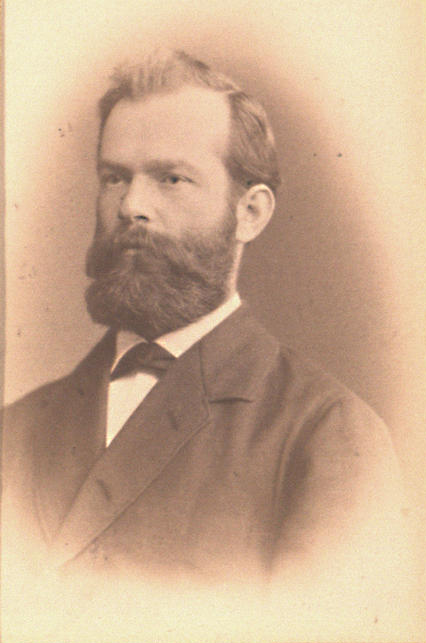 Brandt, Samuel (David Friedrich Ludwig)